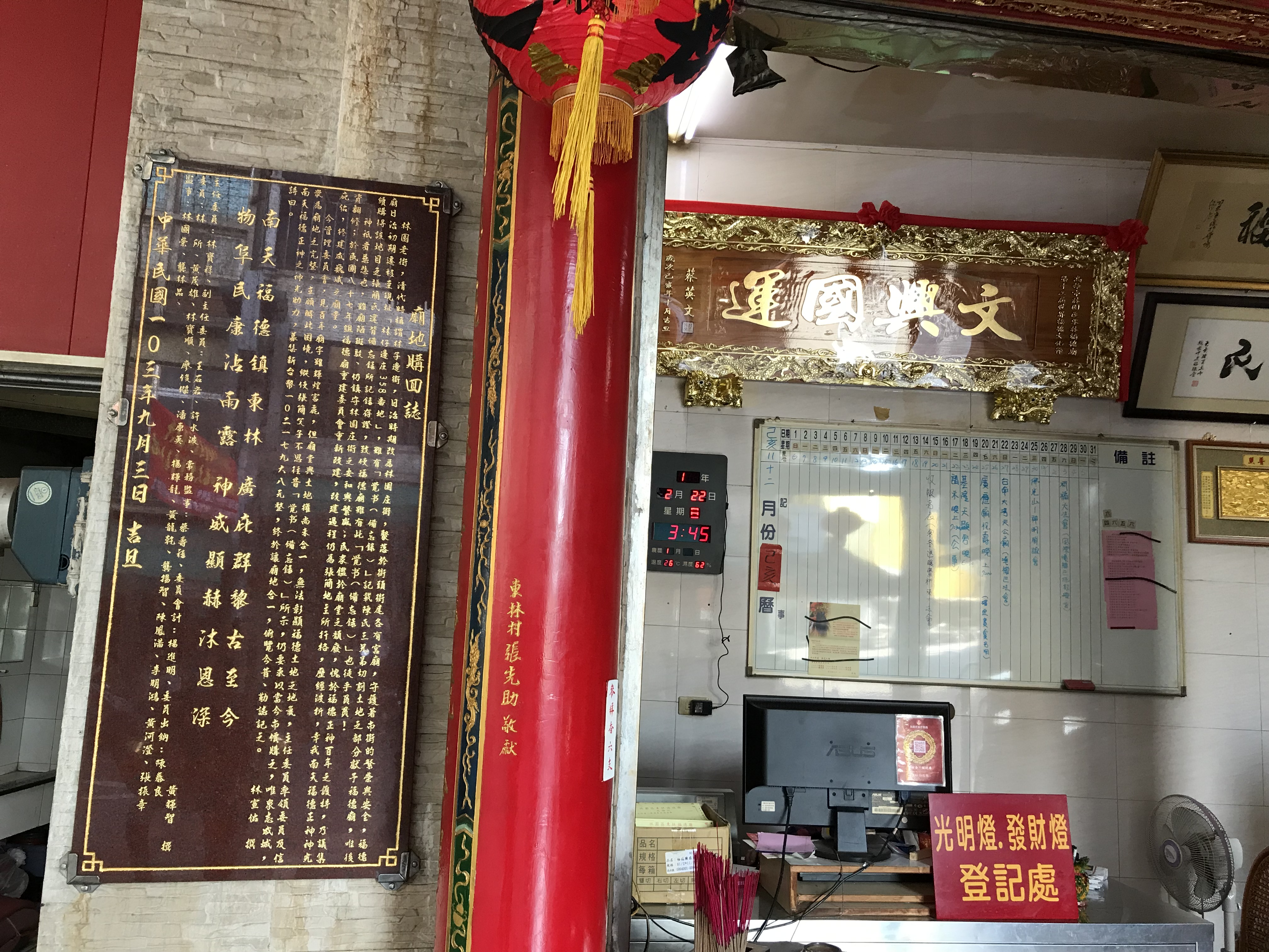 東林福德廟廟地購回誌與「文興國運」匾額